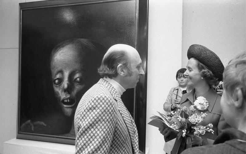 Staatsbesuch des belgischen Königspaares Königin Fabiola im Belgischen-Haus Köln (links: der belgische Maler Octave Landuyt)